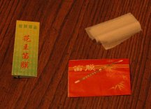 Dizi rice paper